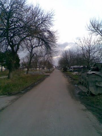 Насеље Јабучки рит